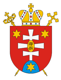 Герб Мукачівської греко-католицької єпархії